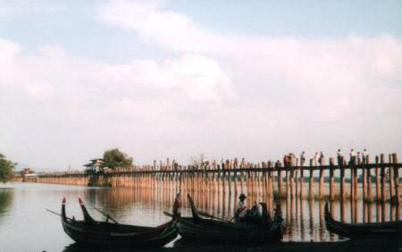 U Bein bridge near Amarapura, Myanmar